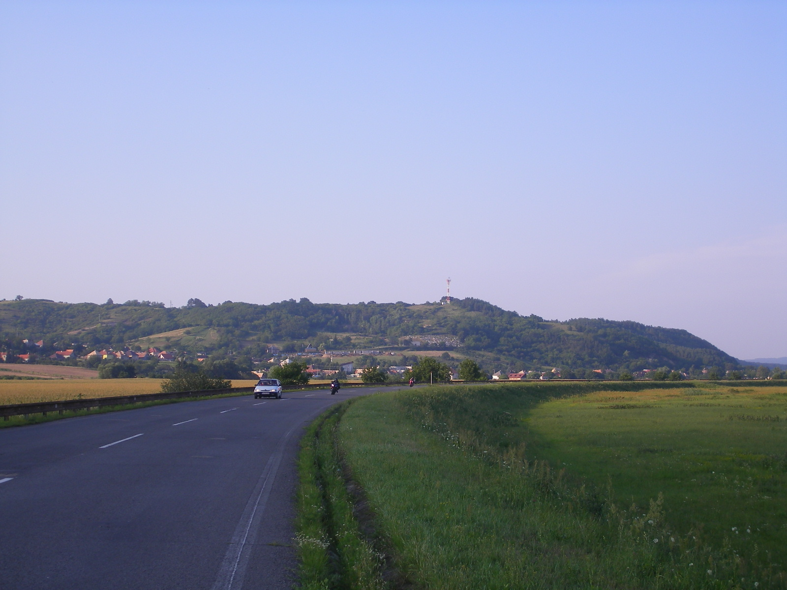 Tótgyarmat - a falu látképe nyugat felől